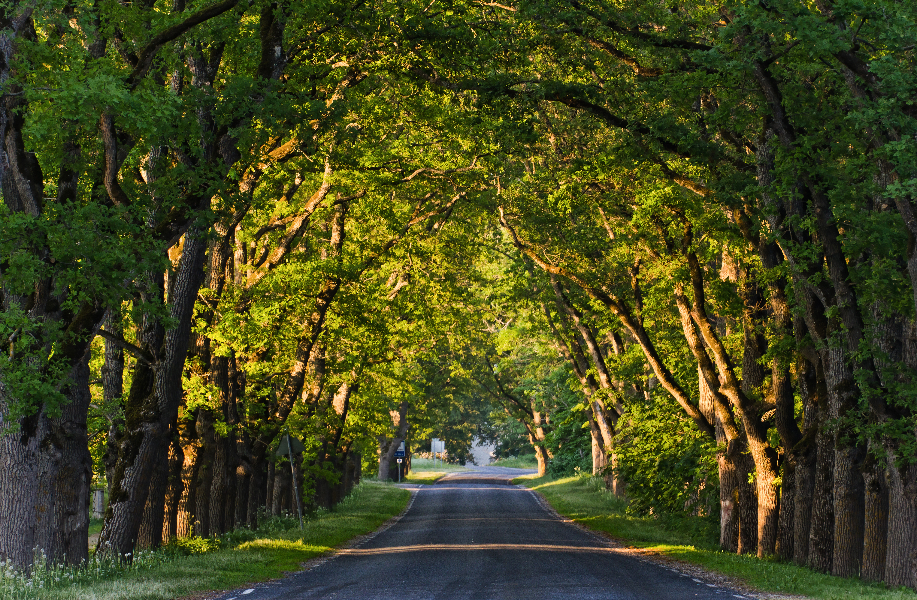 Suuremõisa mõisa allee